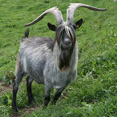 Capra Grigia Projekt von ProSpecieRara